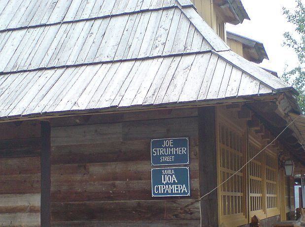 Strassenschilder der "Ulica Joa Stramera" (Joe-Strummer-Street) im sog. Küstendorf vom Filmregisseur Emir Kusturica im serbischen Mokra Gora